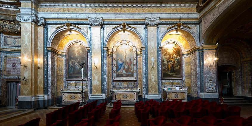 Interno della Chiesa di Santa Caterina da Siena di Napoli, sede storica del CMA Pietà de' Turchini.